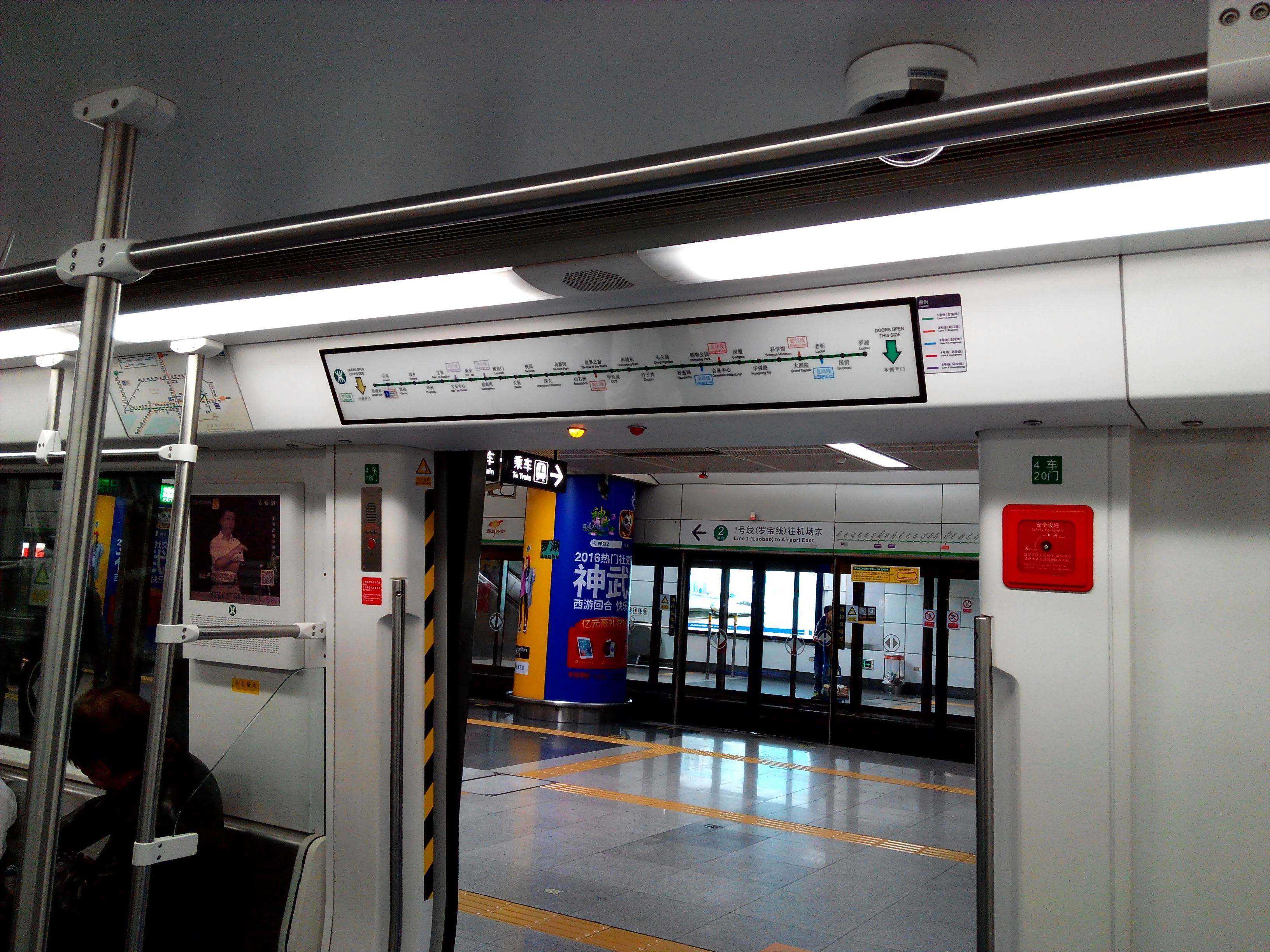 深圳地铁1号线2009增购南车株机A型列车 乘客信息显示屏